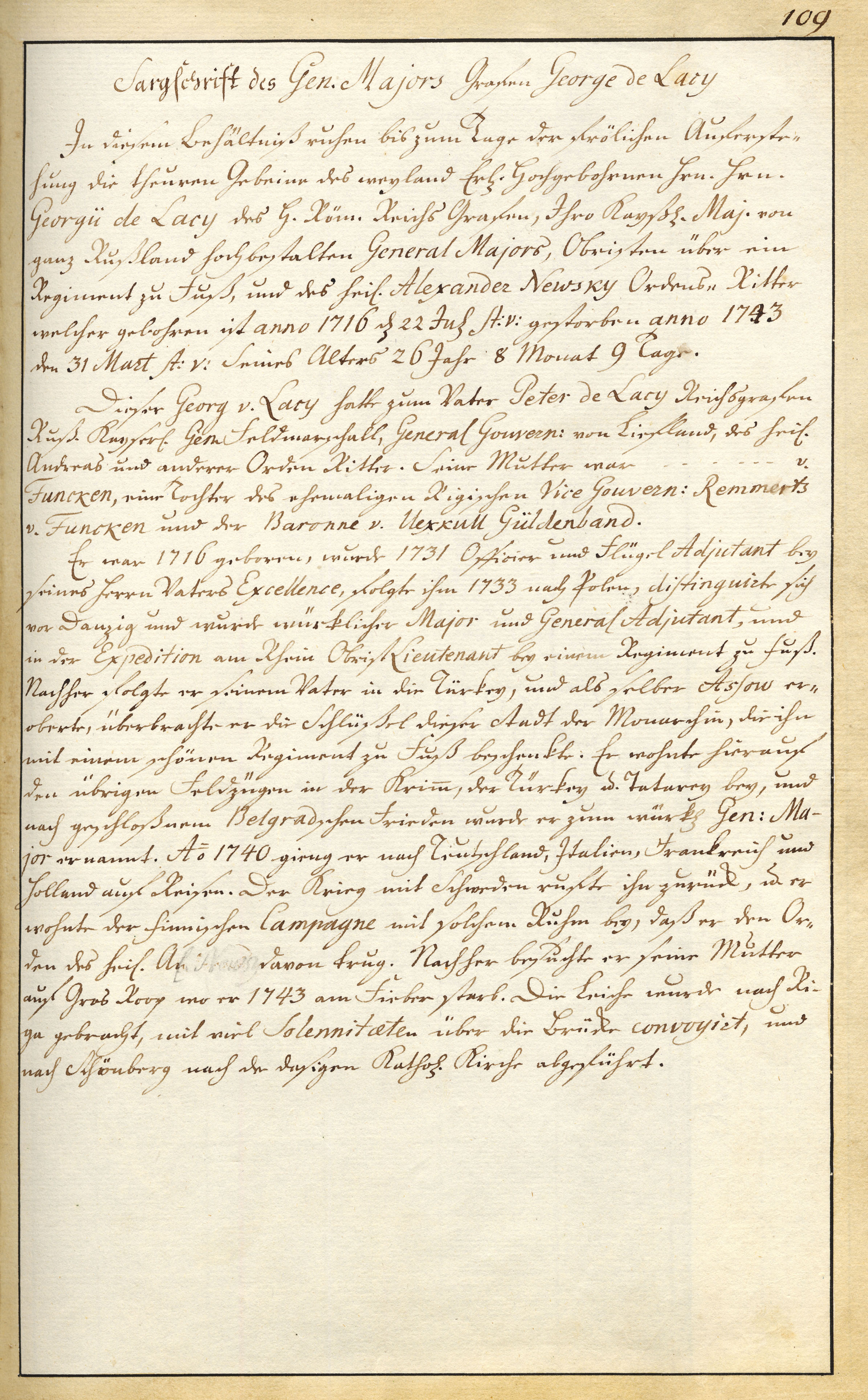 Grabinschrift_Graf_George_de_Lacy